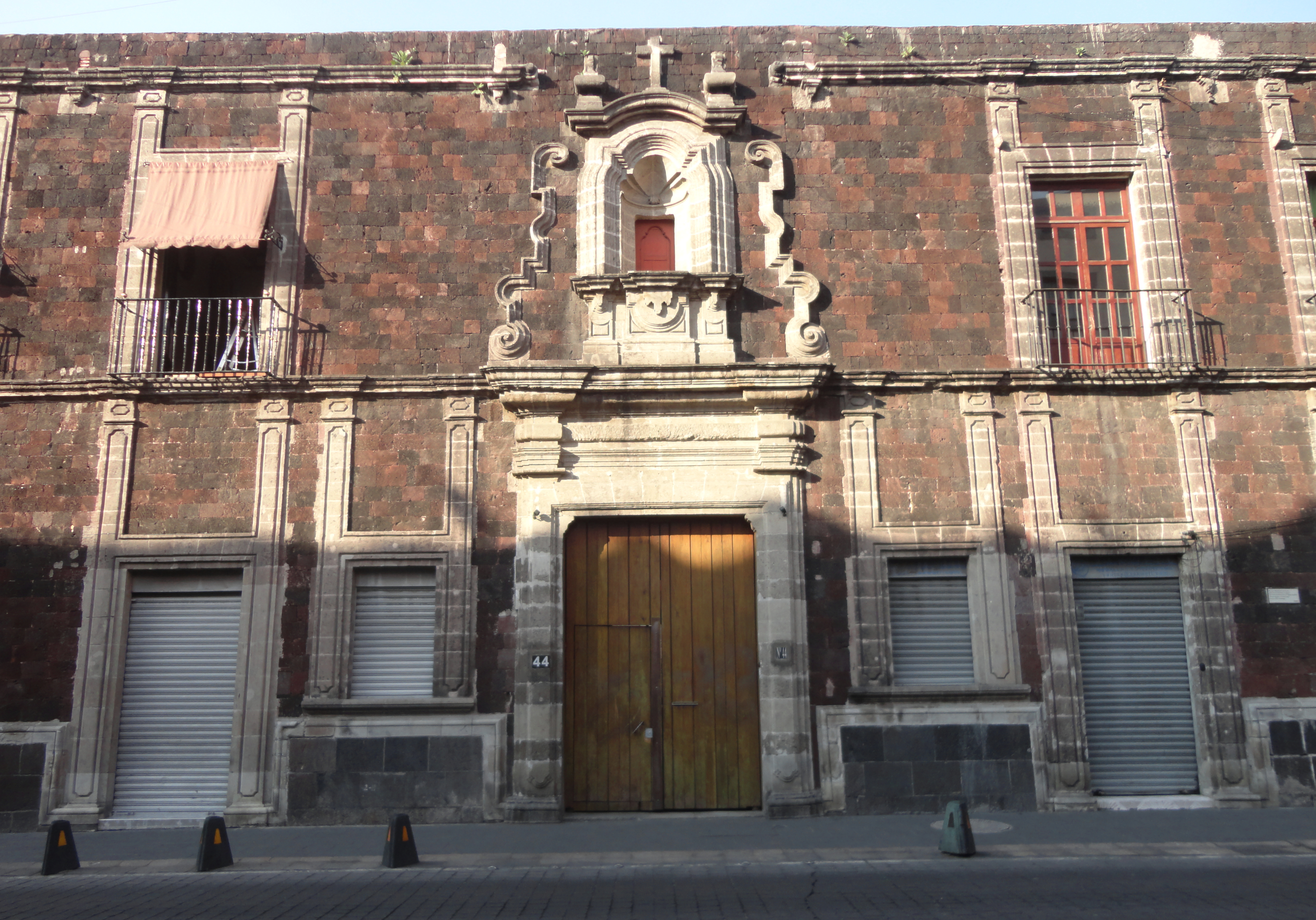 Casa de la Covadonga, Ciudad de México.